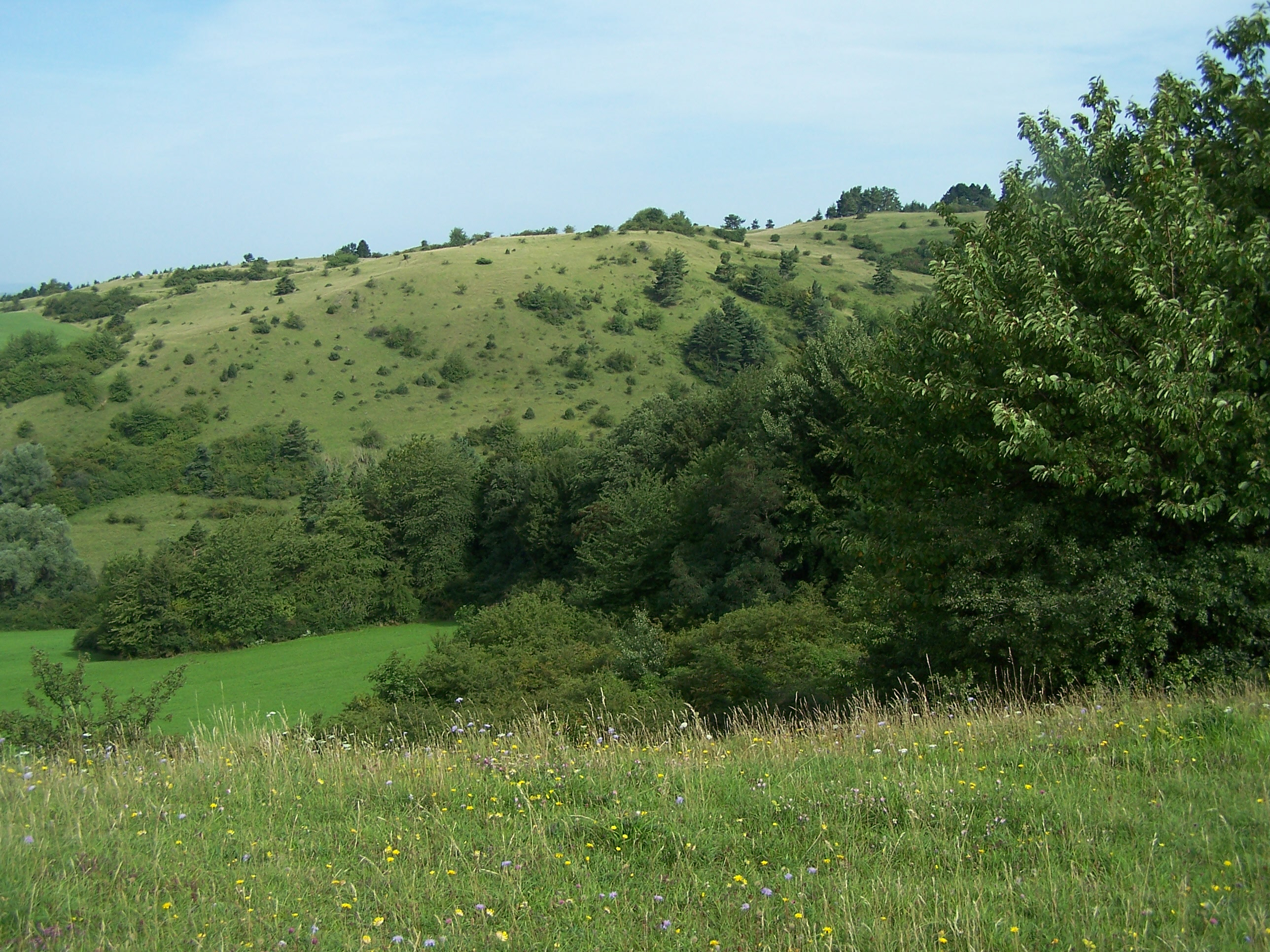 Ansicht des Südhangs (Naturschutzgebiet) des Berges Alte Warth bei Gumpelstadt und Schweina im Wartburgkreis.